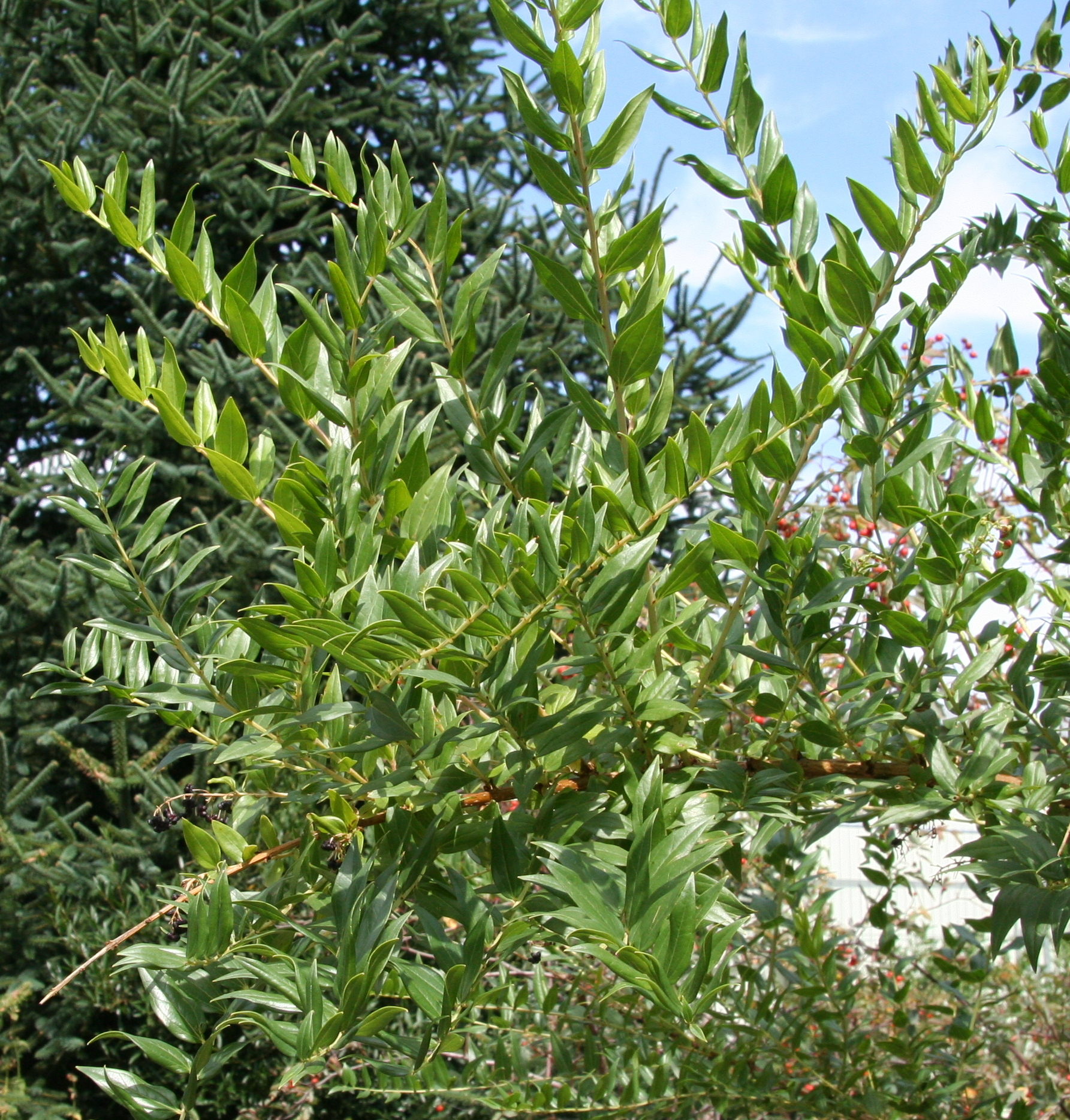 Coriaria myrtifolia im Botanischen Garten Dresden